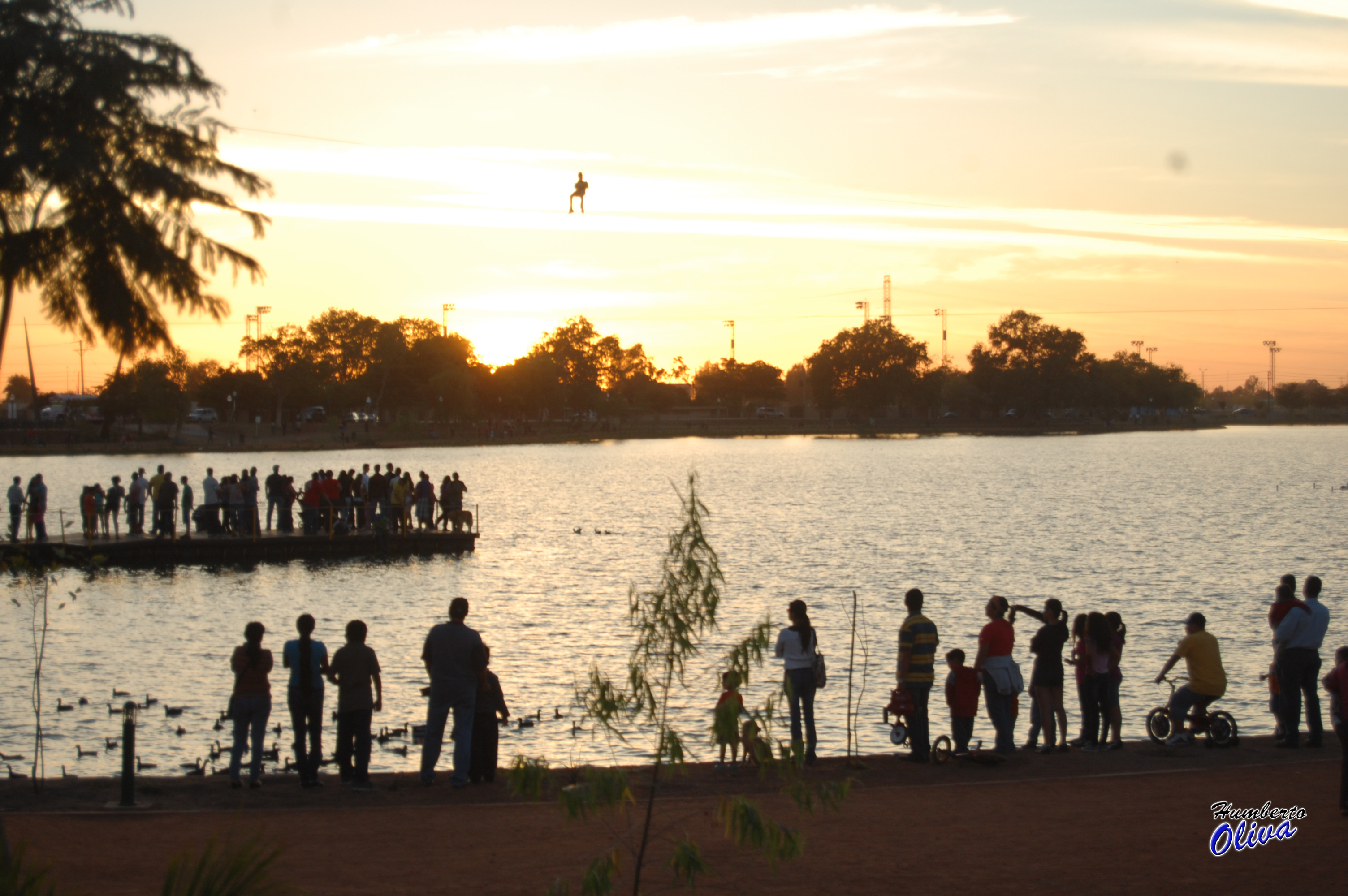 Tirolesa en la laguna del nainari, Ciudad Obregón